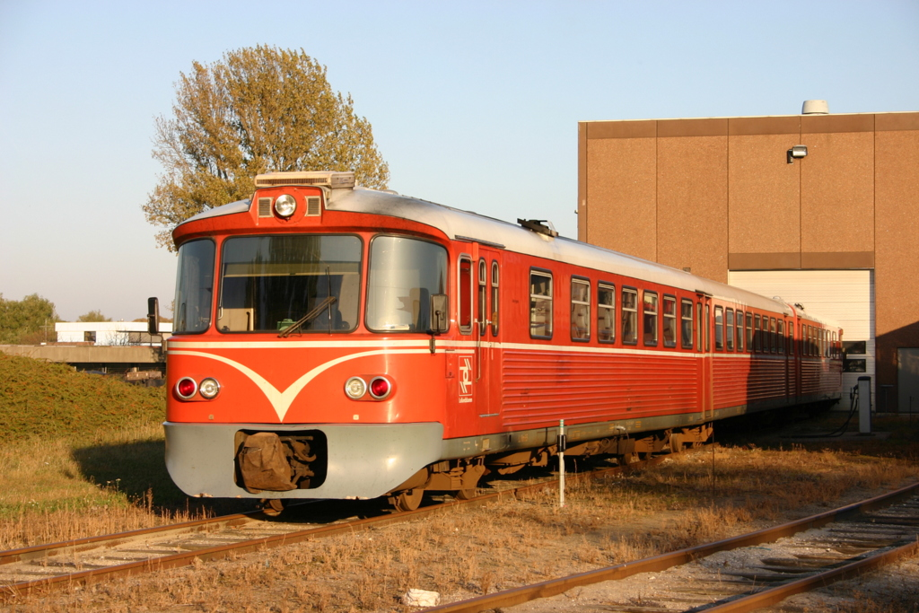 Lollandsbanen LJ Ym 65 am 17.10.2006 in Nakskov